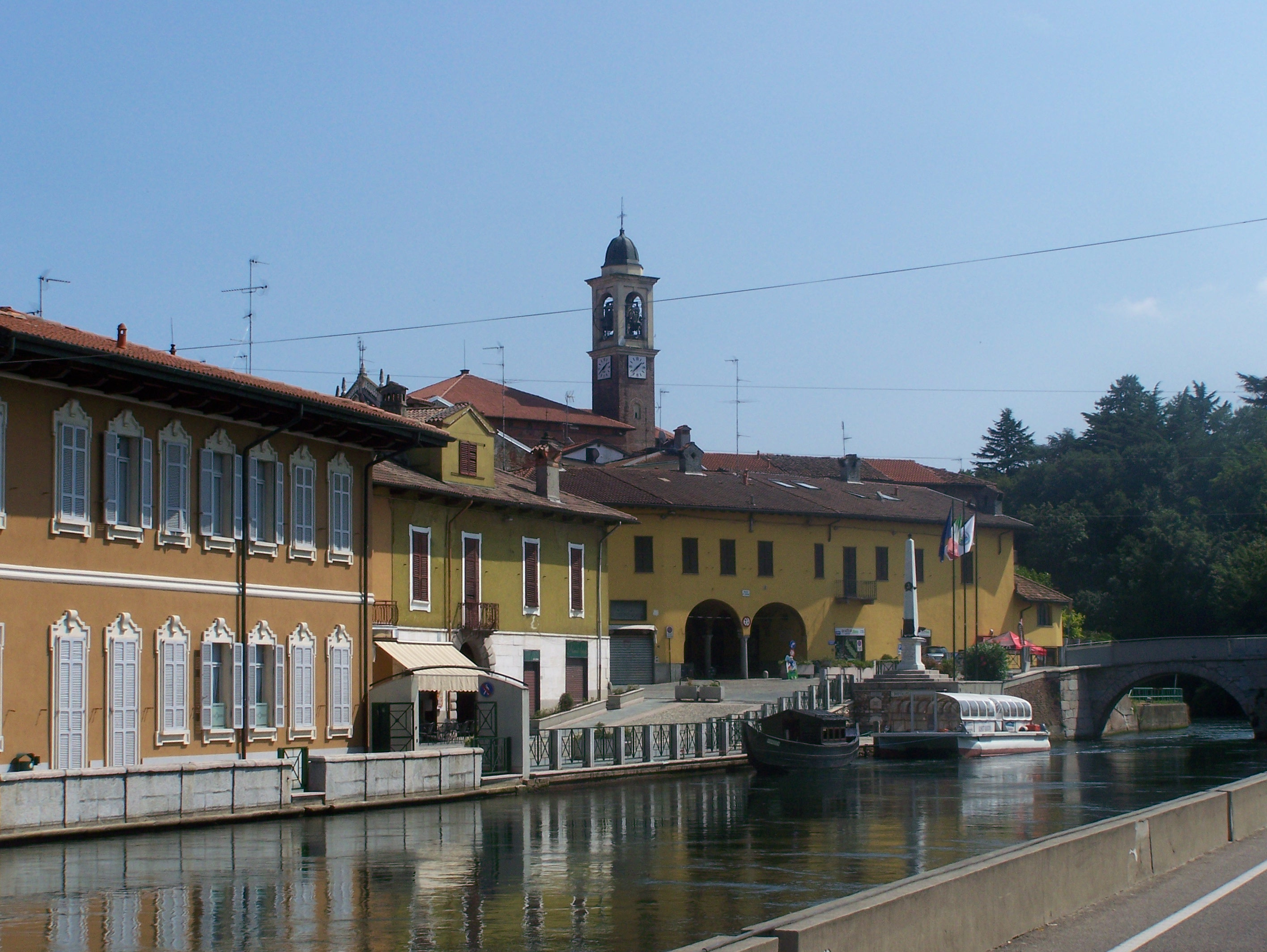 Panorama di Boffalora sopra Ticino (MI) - Italy